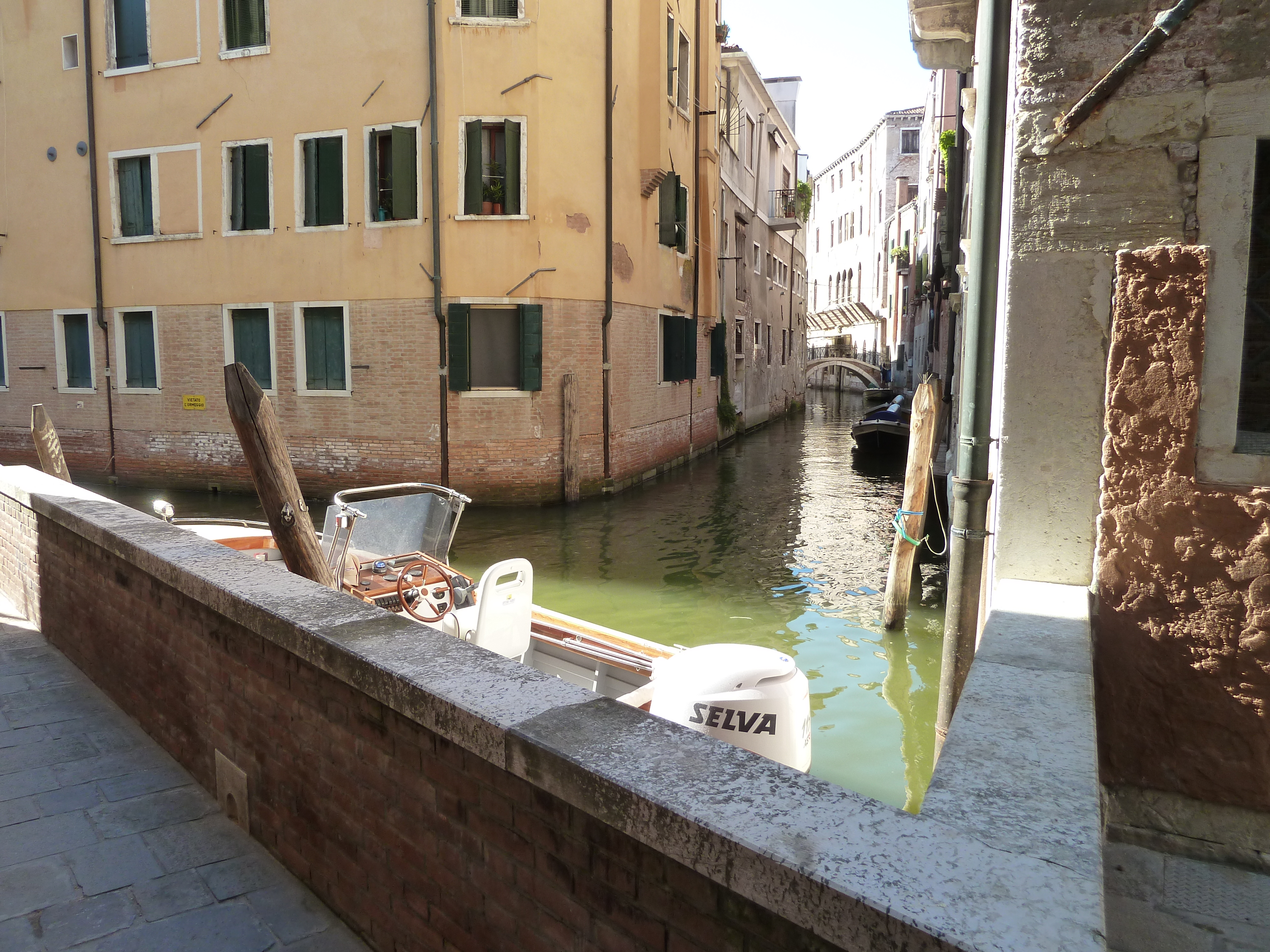 rio maddalena